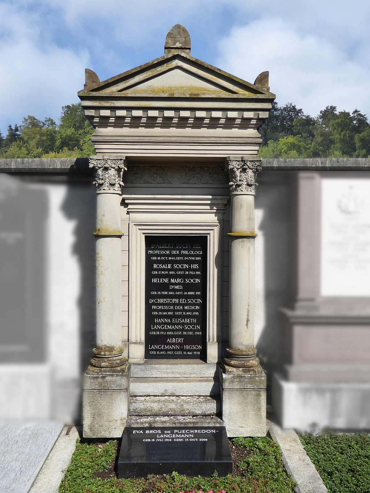 Albert Socin (1844–1899) Professor der Philologie, Orientalist, Alttestamentler. Professor der semitischen Sprachen. Grab auf dem Friedhof Wolfgottesacker, Basel